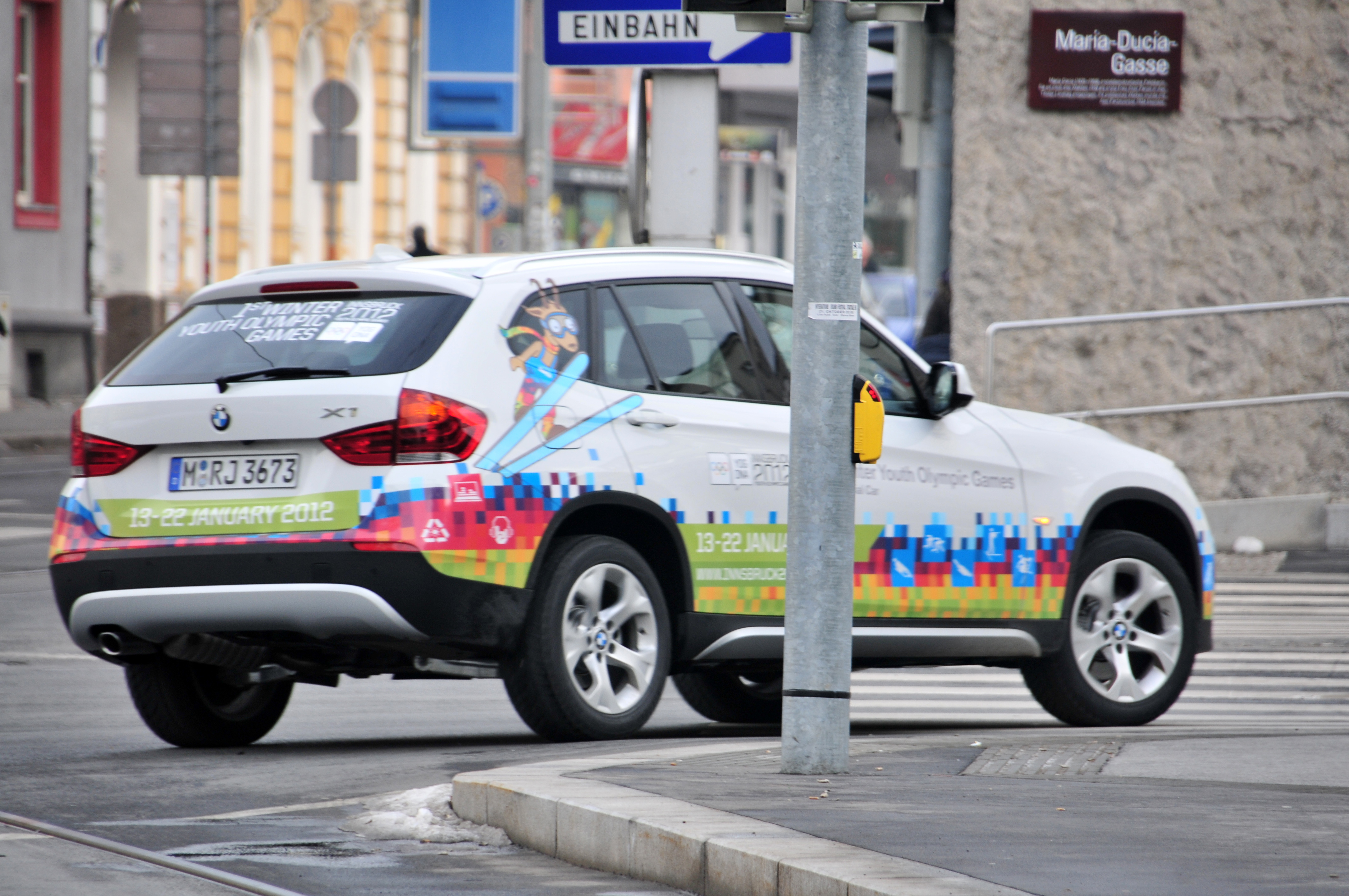 1. Jugendolympiade 2012 Innsbruck Erste Olympische Jugend- Winterspiele 201213. bis 22. Jänner in Innsbruck Dieses Foto wurde durch die Unterstützung von Wikimedia Österreich und die Twoonix Software GmbH ermöglicht.